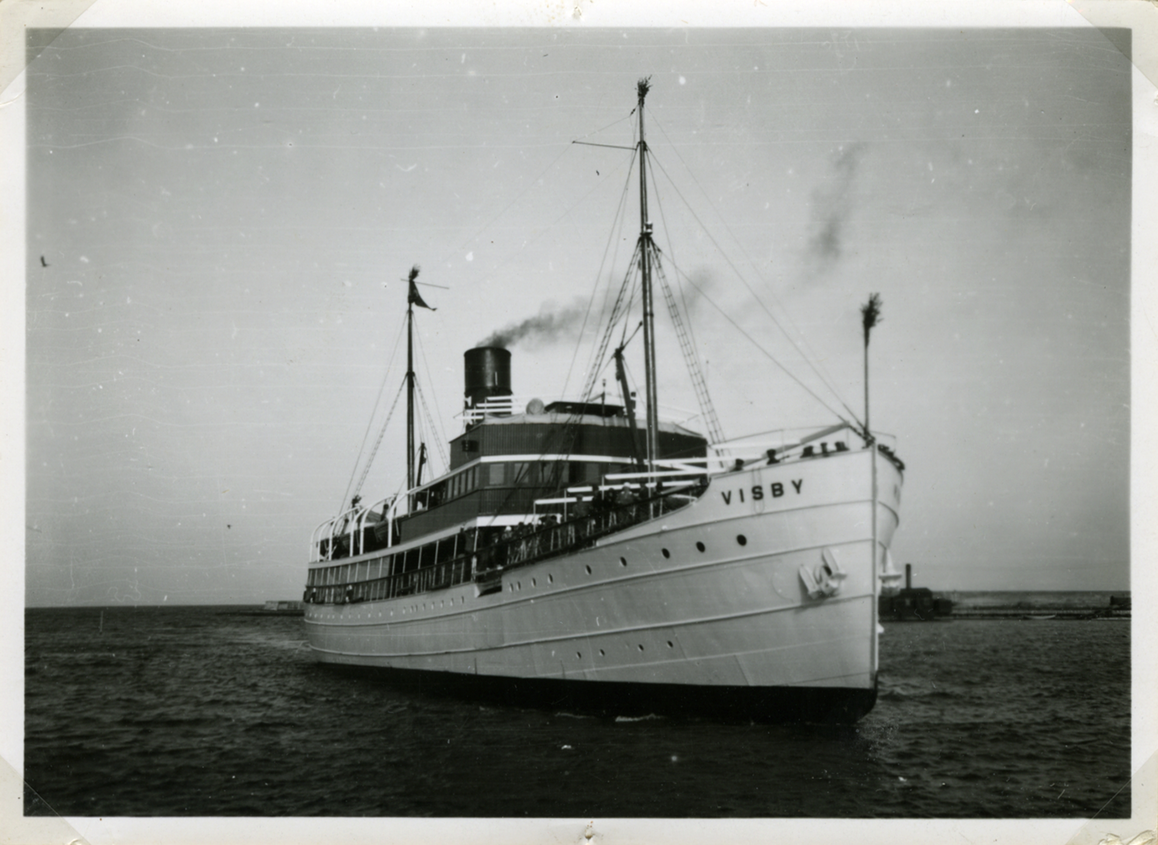 Fartyg: VISBY Bredd över allt 9,42 meter Längd över allt 54,34 meter Reg. Nr.: 7106 Rederi: Ångfartygs AB Gotland Byggår: 1924 Varv: Oskarshamns MV Övrigt: VISBY=SKAGEN II Reg nr 7106, 54,34 x 9,42 m, 900 ihk, 828 brt, 565 nrt, 400 passagerare. Byggdes 1924 av Oskarshamns MV för Ångfartygs AB Gotland. Gjorde ett antal lustturer i Stockholm och Visby innan ångaren sommaren 1924 insattes på traden Stockholm?Södertälje?Visby. Användes i trafik under krigsåren och ombyggdes för oljeeldning 1946. Rederiets namn ändrades 1962 till Rederi AB Gotland. Visby såldes i januari 1963 till Sten Olsson (Rederi AB Skagenlinjen) och omdöptes till Skagen II. Insattes på traden Göteborg?Lysekil?Skagen. Eldhärjades 28.2 1964 i förskeppet, varvid tre människor förolyckades. Skagen II reparerades på Götaverken och sattes in i trafik 4.4 1964 på traden Bergkvara?Bornholm (?Allinge). Såldes i december 1964 till Rederibolaget Sarabande, Olsson & Co KB i Göteborg och insattes 1965 återigen på linjen Lysekil?Skagen. Återfördes till Stena AB i slutet av 1966. Såldes 1968 till Persöner i Ystad och skrotades. (Svensk kustsjöfart 1840-1940)